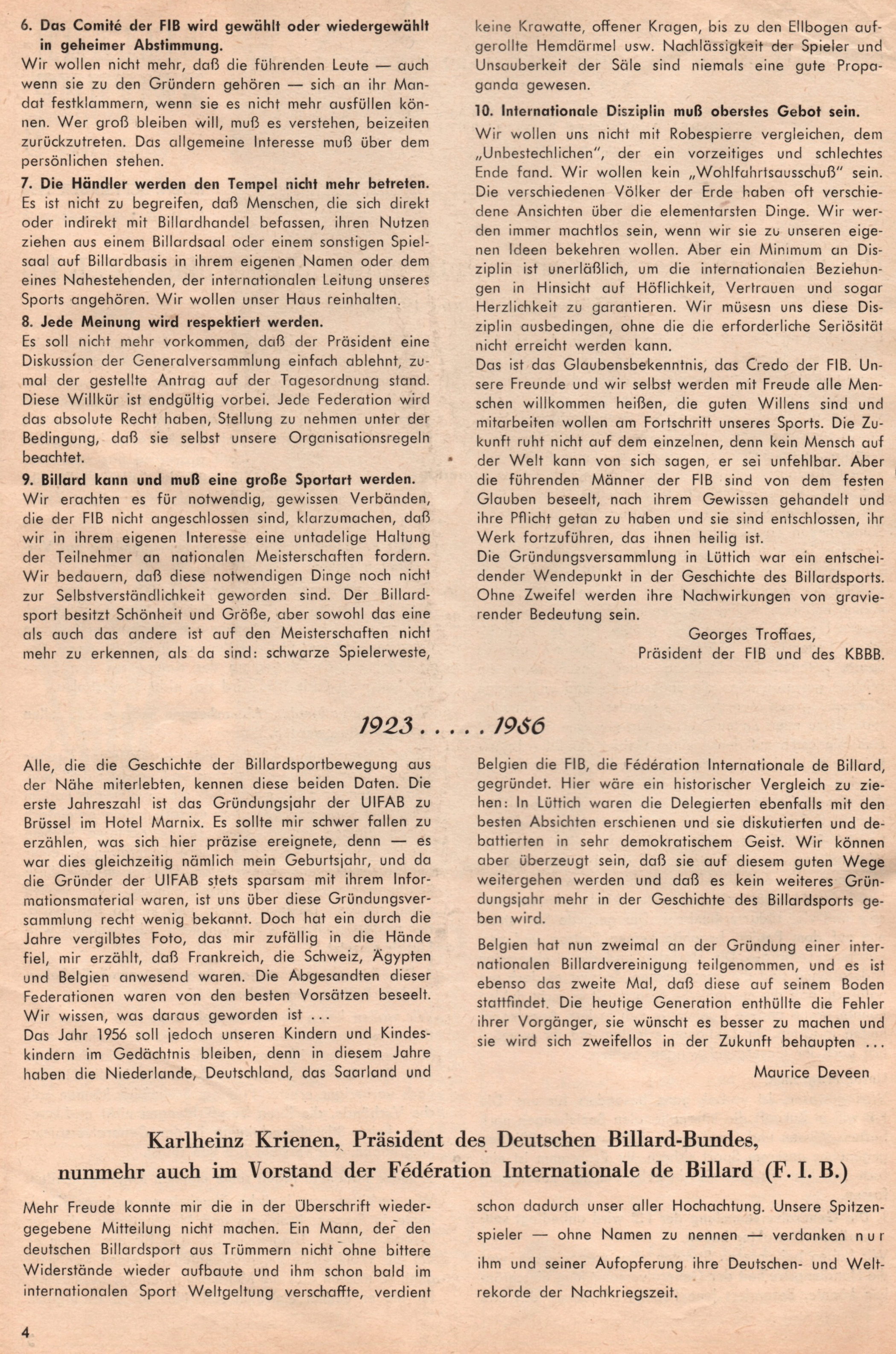 see file name